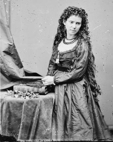 Vinnie Ream (1846-1914)